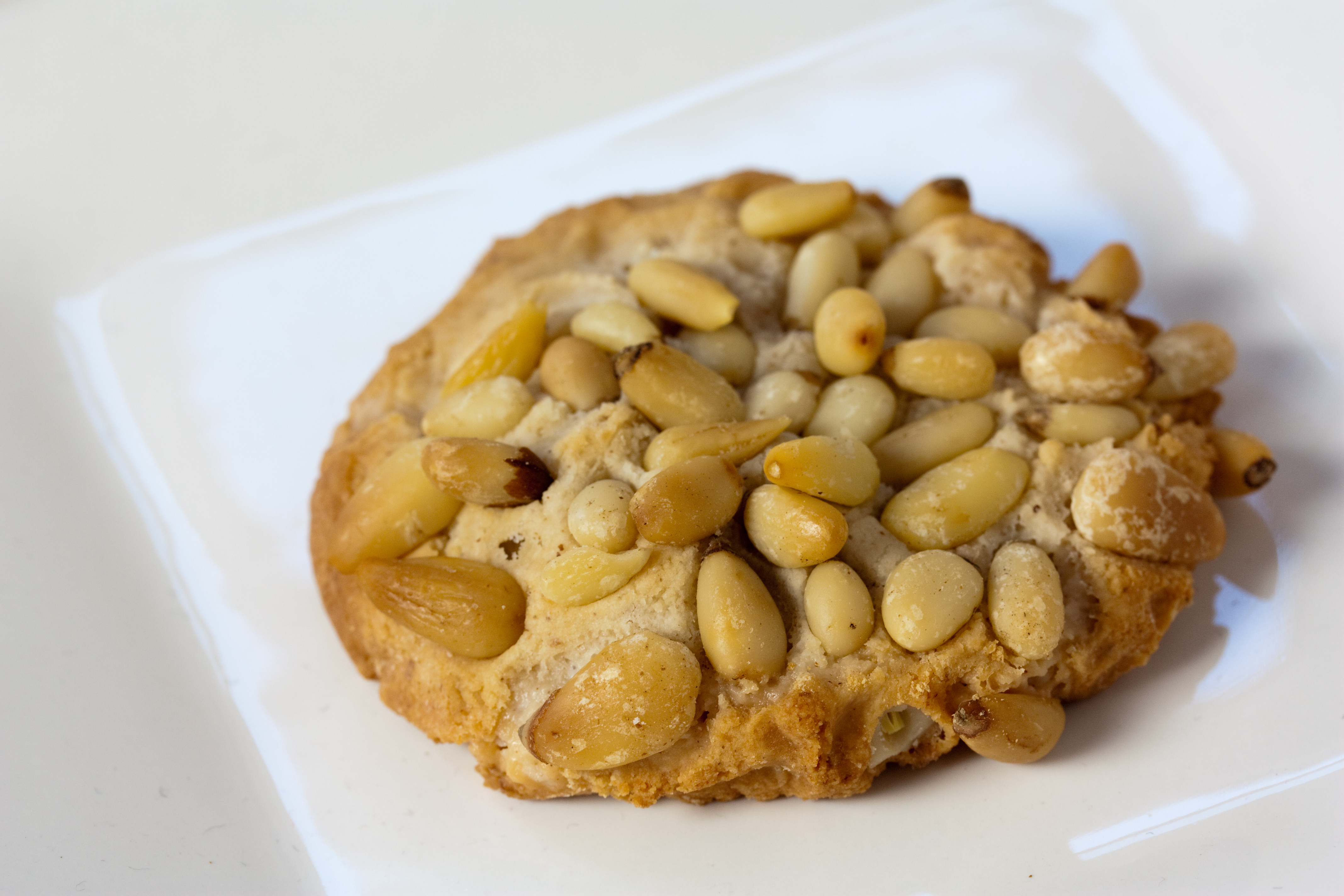 Vegan Pignoli Cookie